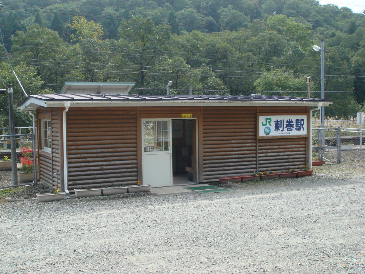 Sashimaki Station, on the Tazawako Line, Semboku, Akita, Japan